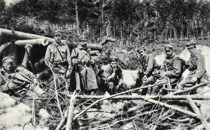 Optowa, placówka por. Wielkopolanina